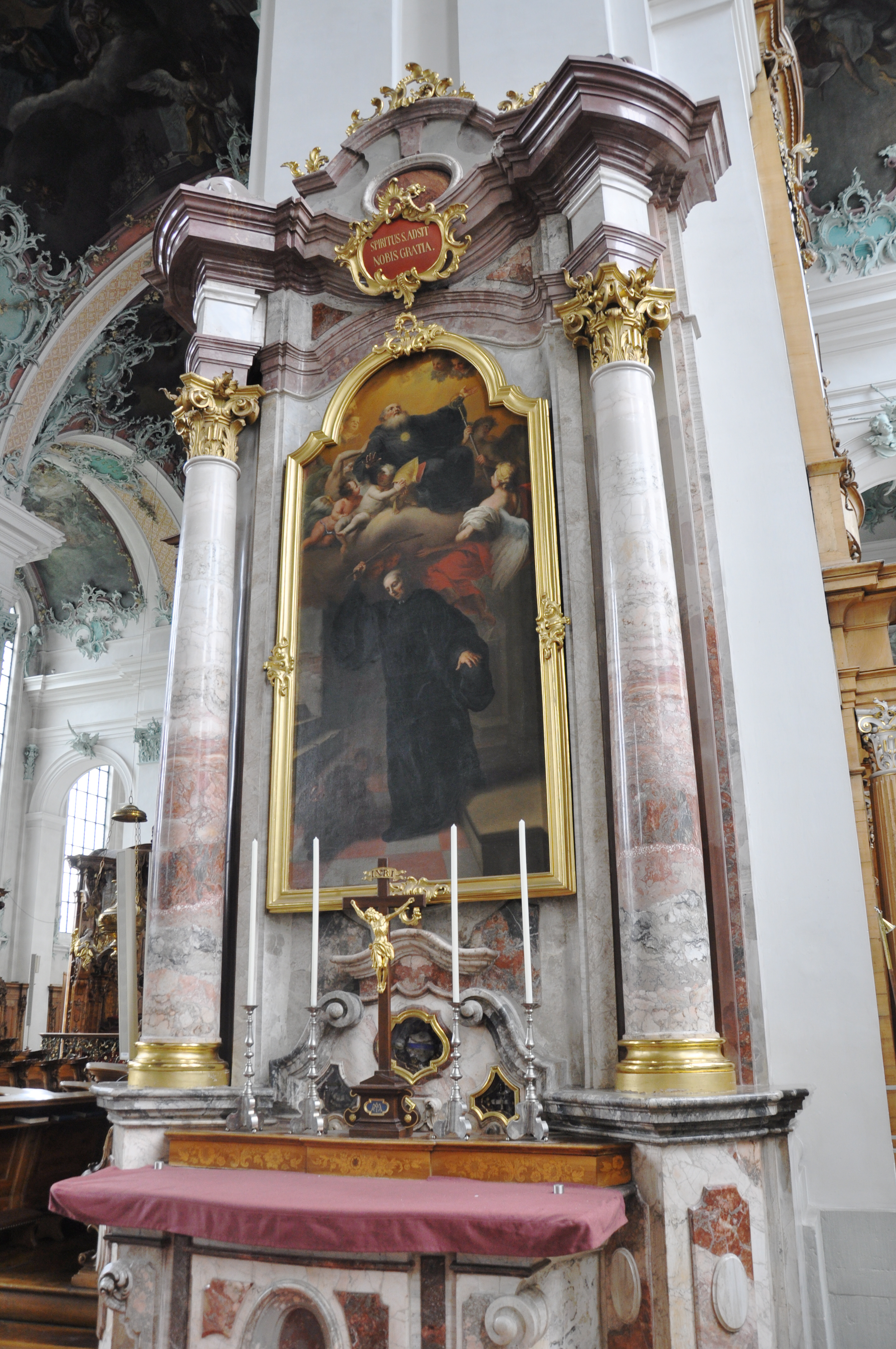 St. Gallen, Stiftskirche, Seitenaltar "St.-Notkers-Altar", mit Altarblatt von Greser: Der Kampf Notkers mit dem Teufel in Hundsgestalt